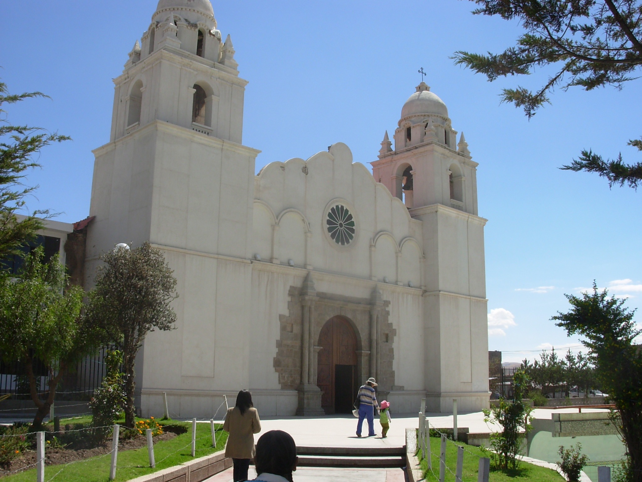 Chupaca, templo catolico